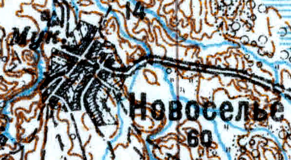 Топографическая карта Ленинградской области, квадрат VIc-28 (Луга), деревня Новоселье Серебрянского СП